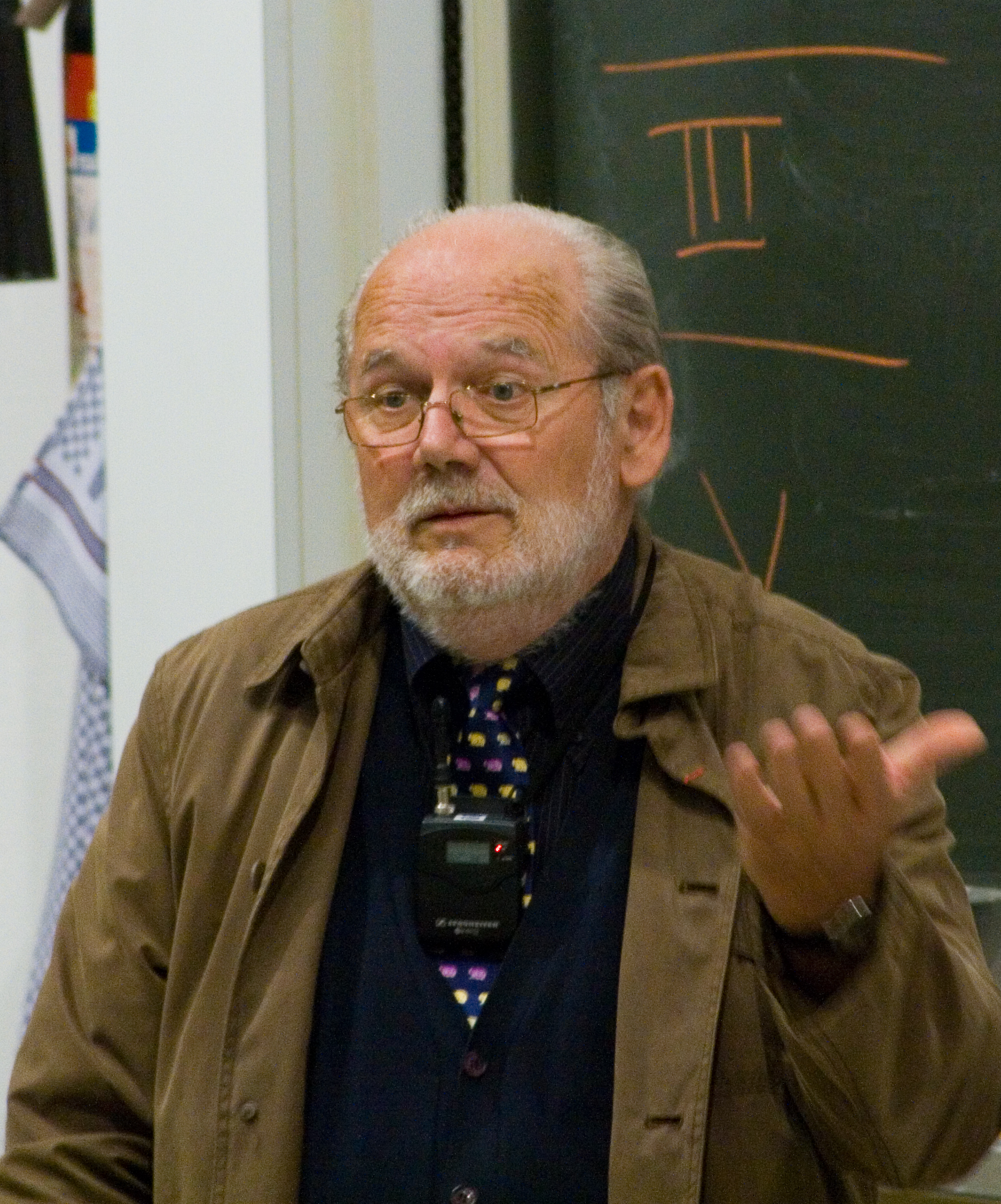 Michel Brunet lors d'une conférence le 10 septembre 2008 à l'université de Fribourg en Suisse